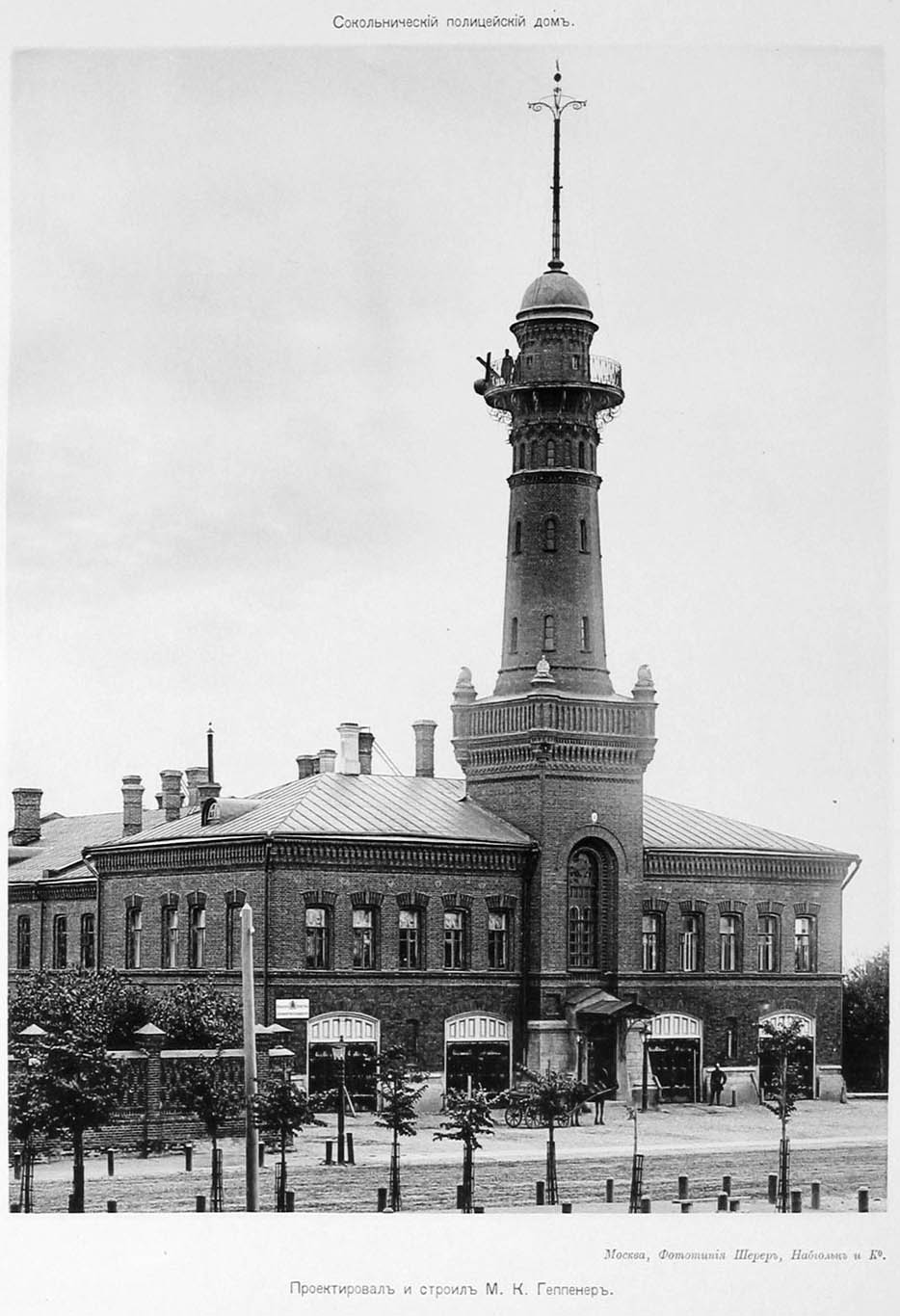 Sokolniki Fire Tower, Moscow